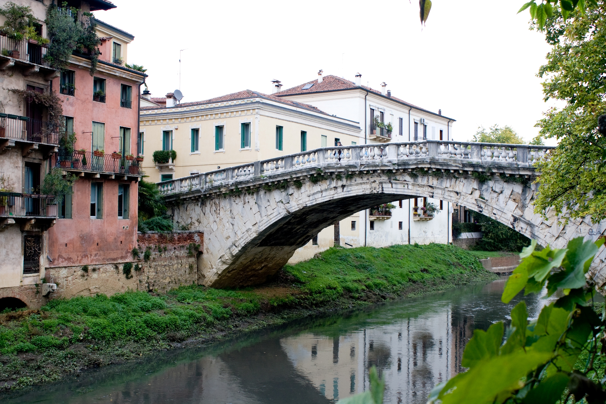 Vicenza - Ponte Sa Michele, rocostruito nel '600